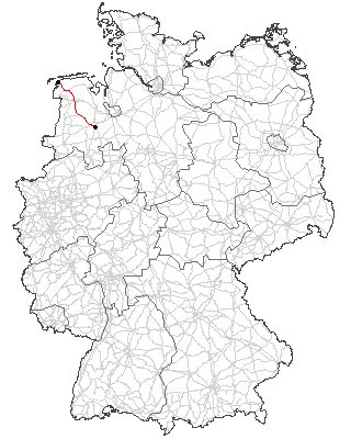 Verlauf der B 72